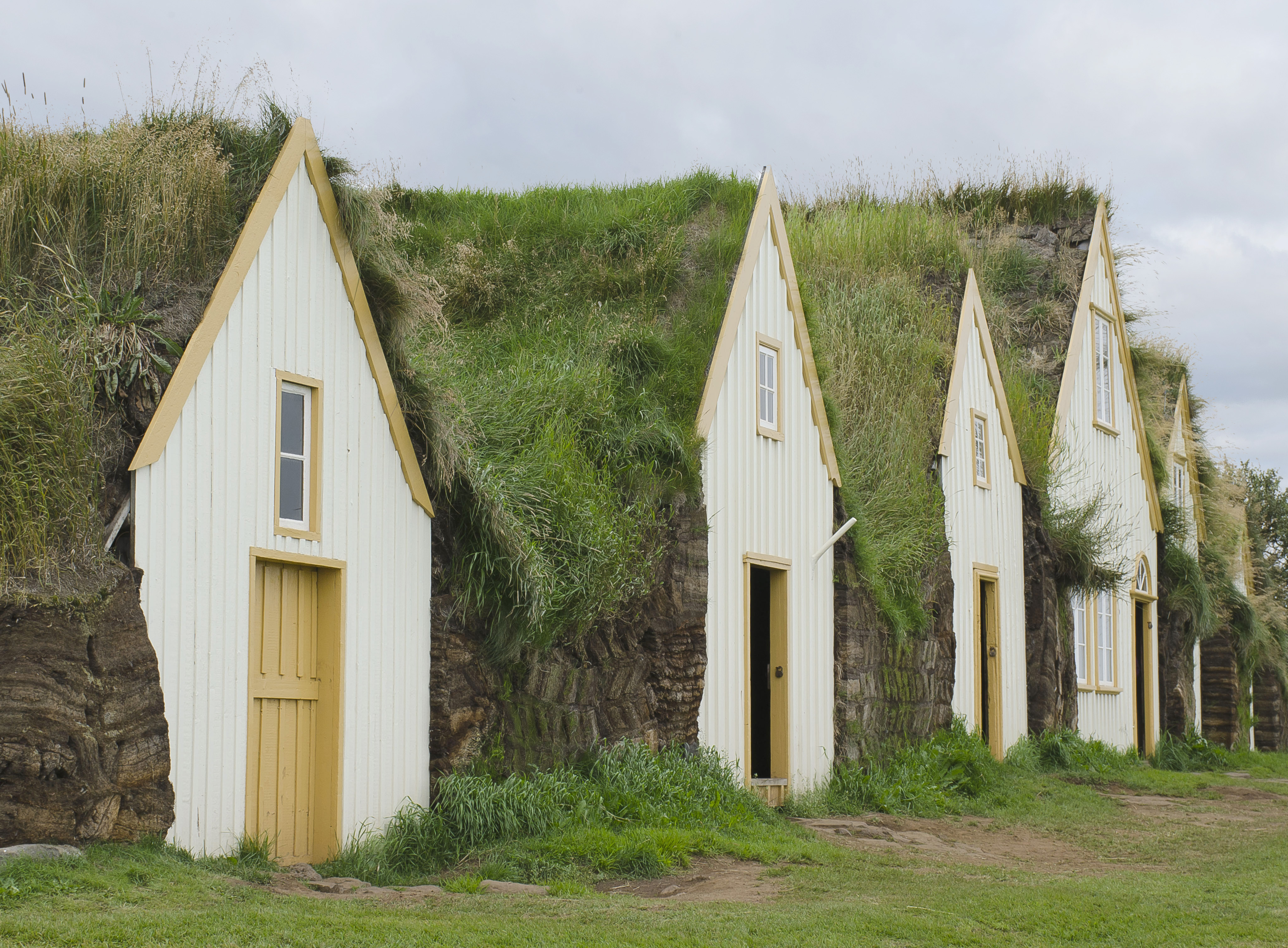 Glaumbær, Iceland